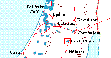 Localisation de Gush Etzion durant la Guerre de Palestine de 1948. Carte réalisée par Ceedjee contact 21 décembre 2006 à 00:40 (CET)